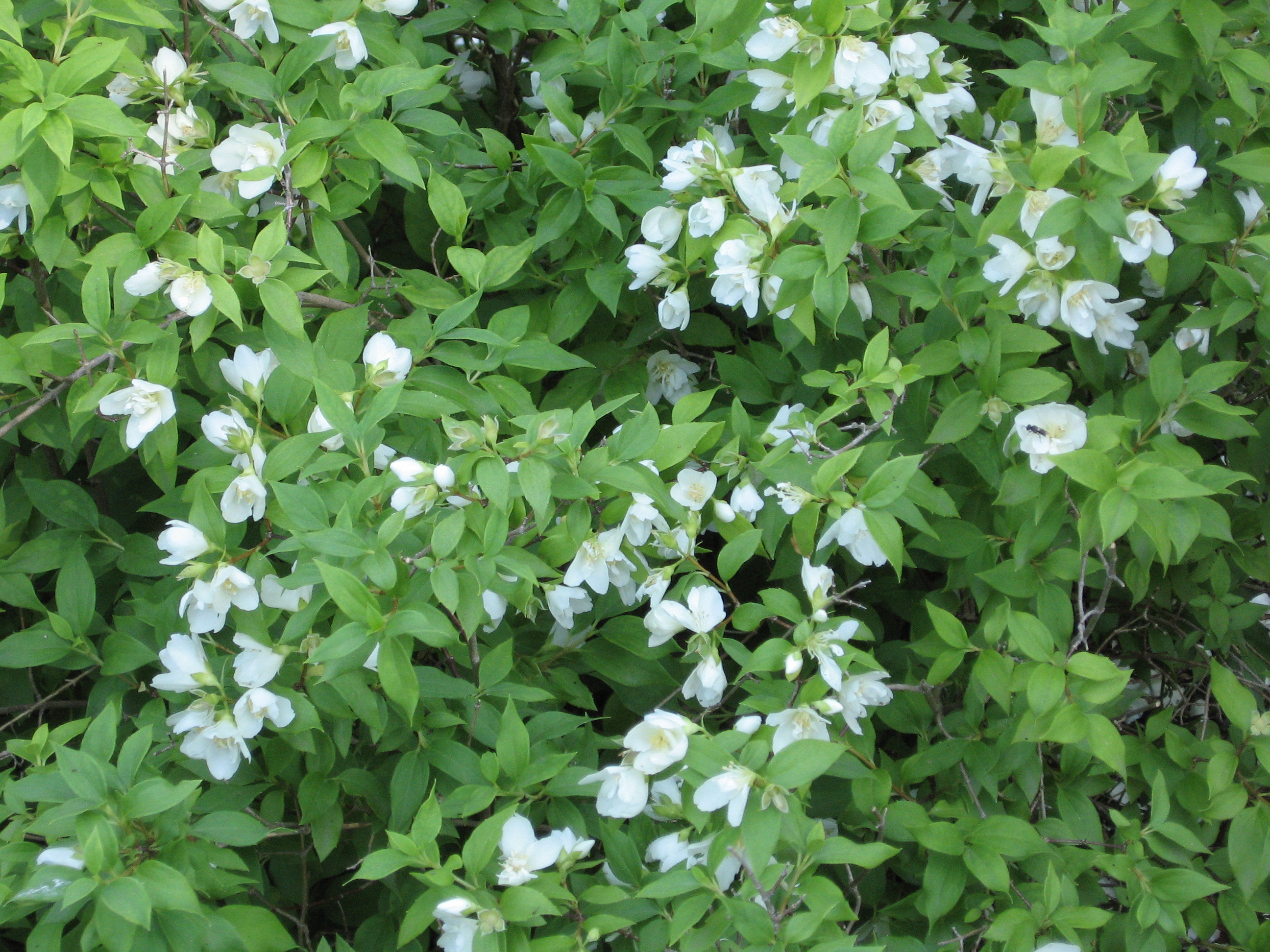 Philadelphus x lemoinei 'Manteau d'Ermine'. Real Jardín Botánico de Madrid.